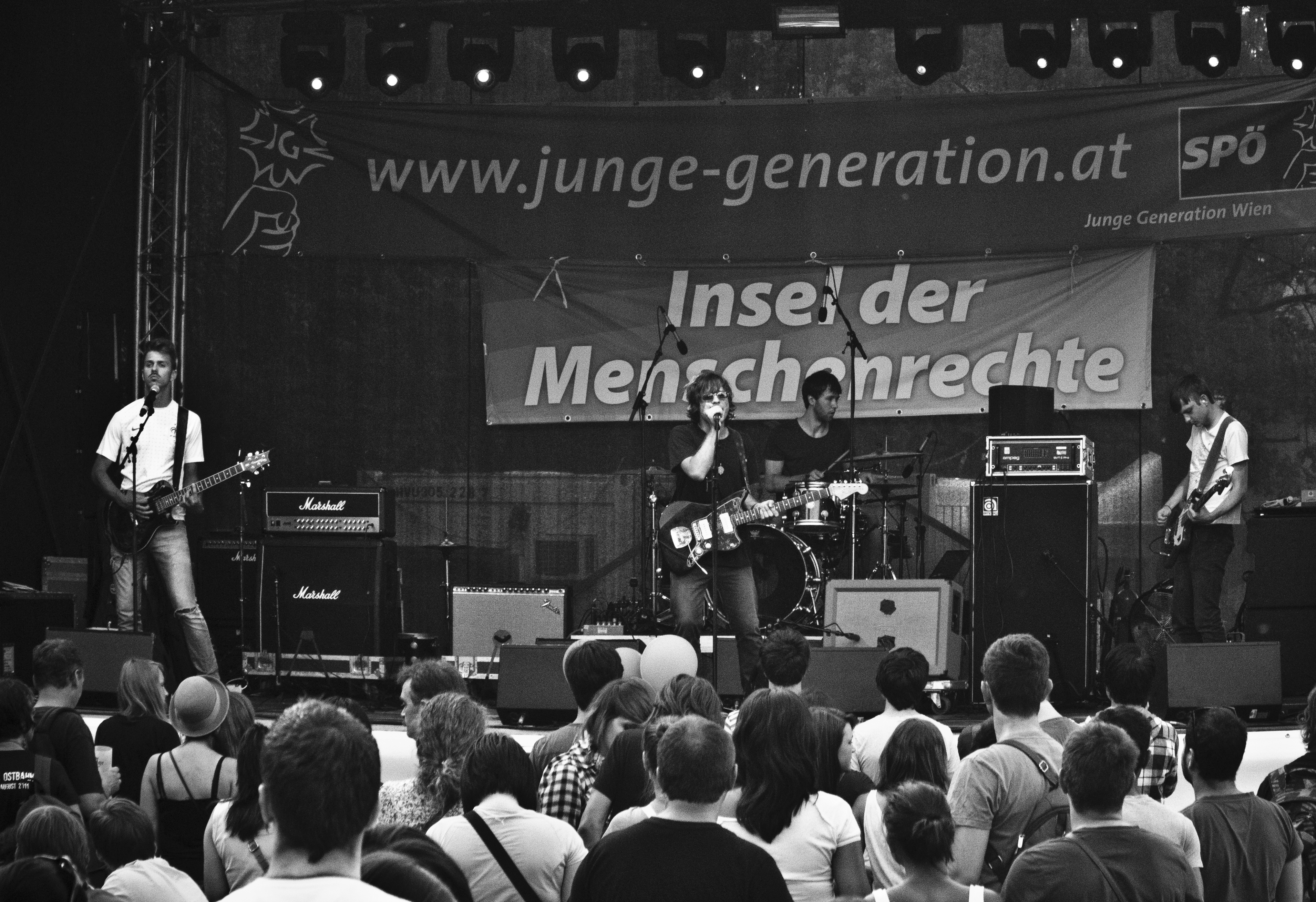 Stereoface Concert @ Donau Insel Fest (Vienna, Austria) 20.06.2012